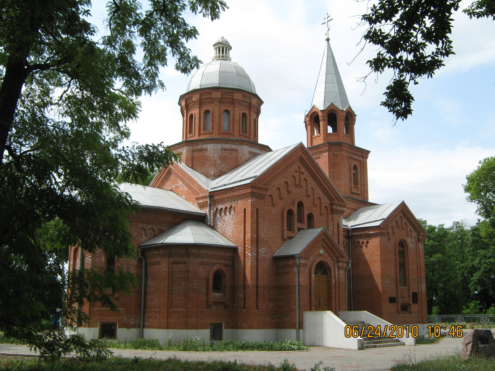 Свято-Георгіївська церква